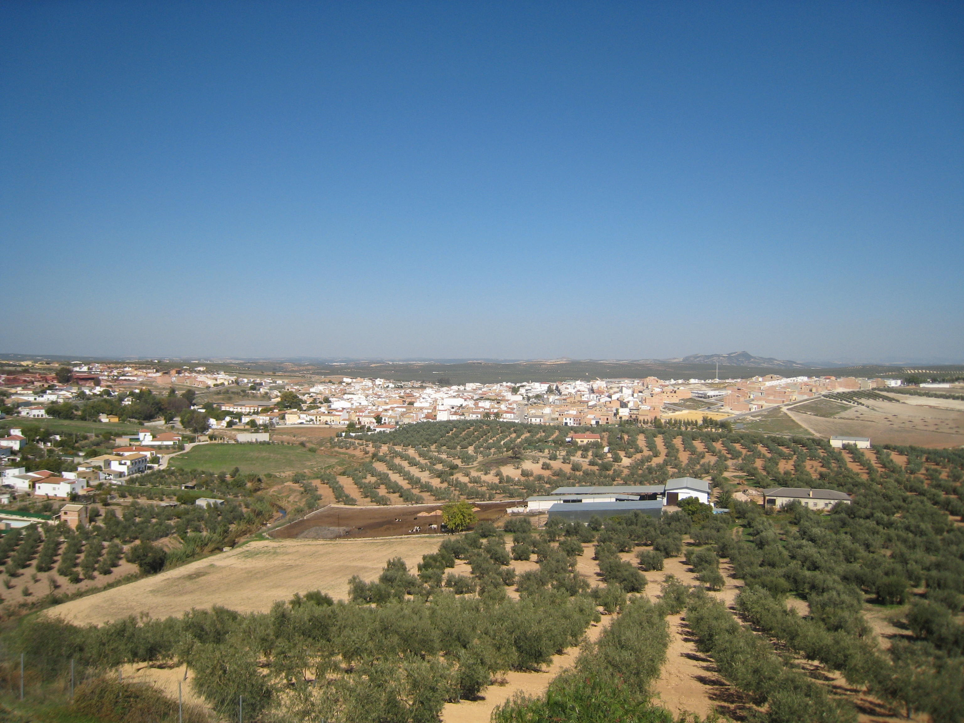 Vista panorámica de Casariche (tomada desde el mirador del Cerro Bellido).